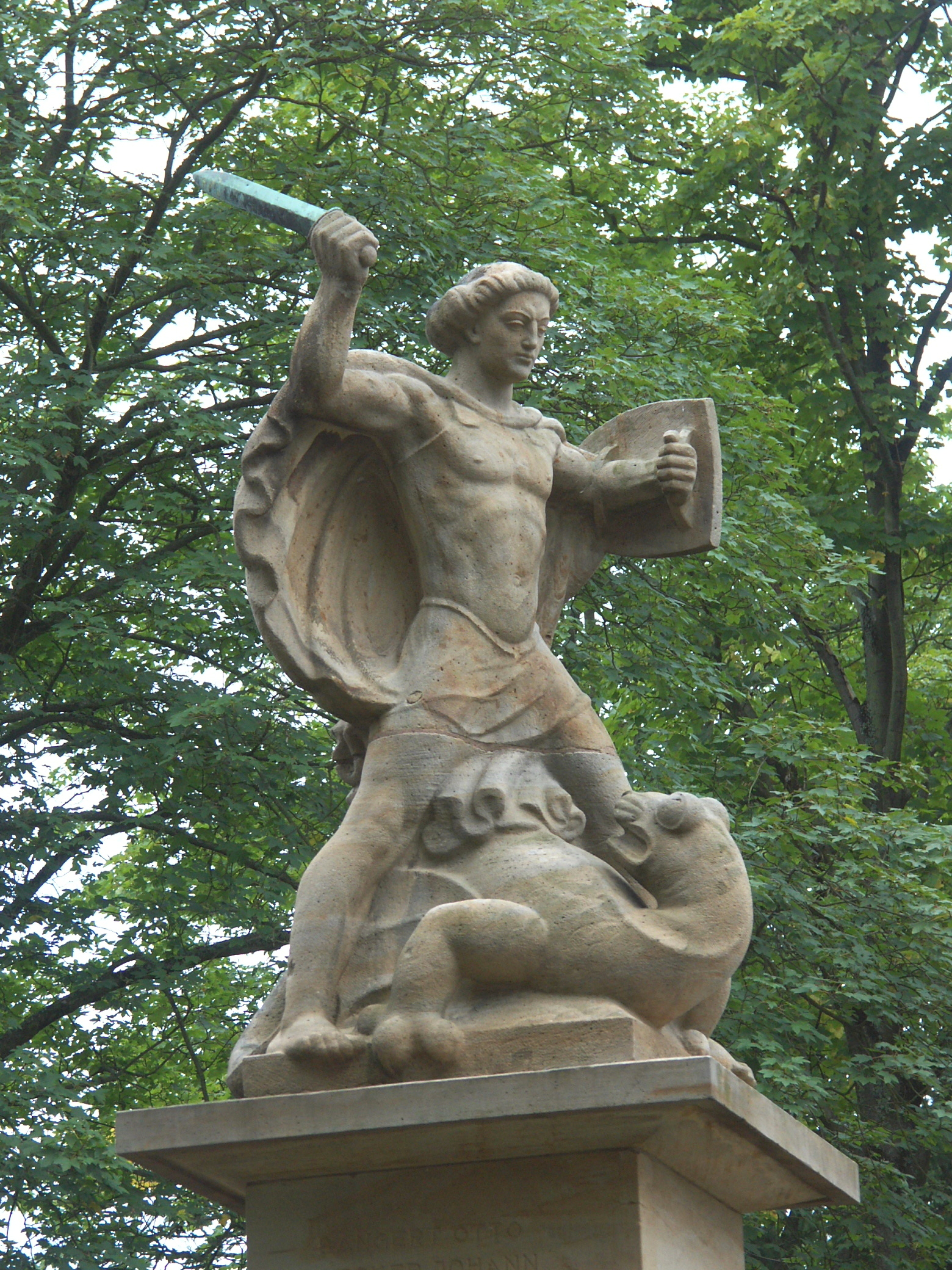 War Memorial - Krieger-/Kriegsopferdenkmal - Mémorial de guerre